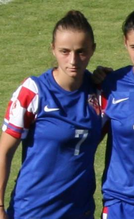 Katarina Kolar